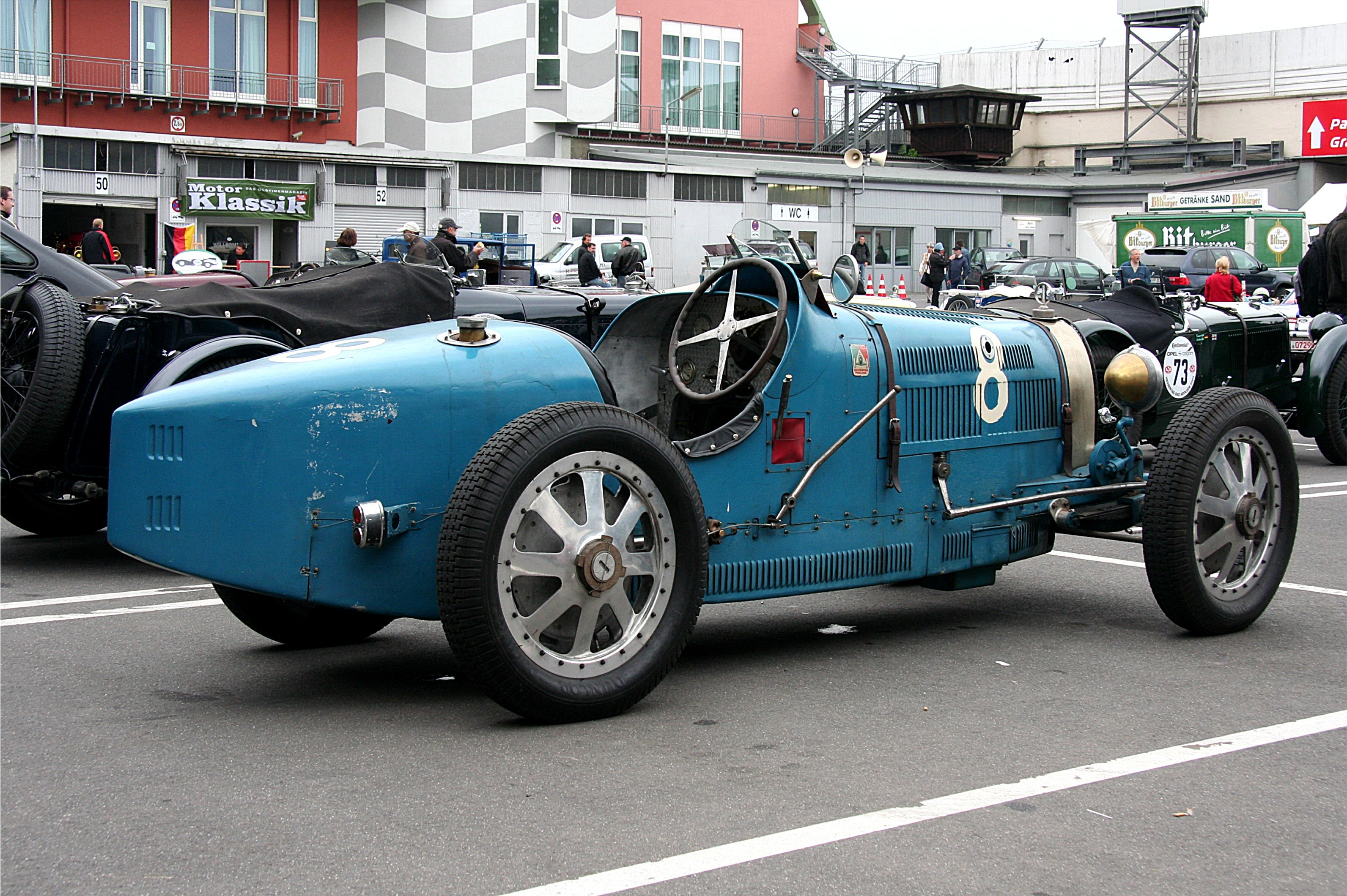 Bugatti Typ 35 B, Baujahr 1925